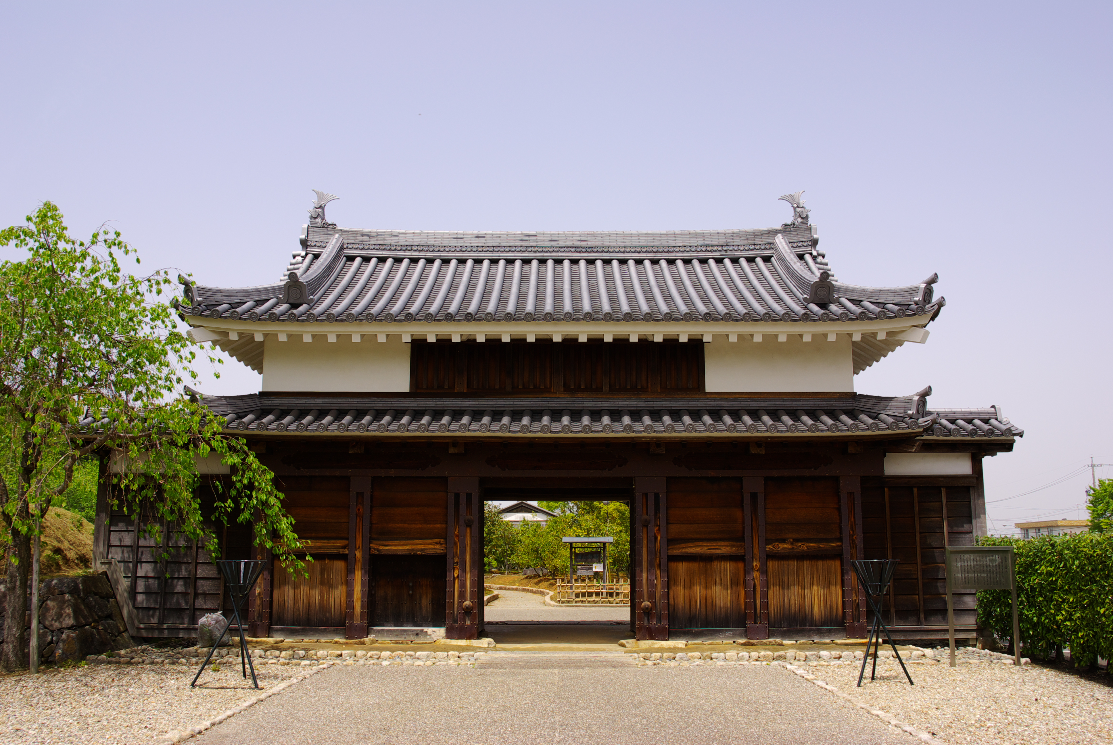 愛知県西尾市の西尾城鍮石（ちゅうじゃく）門